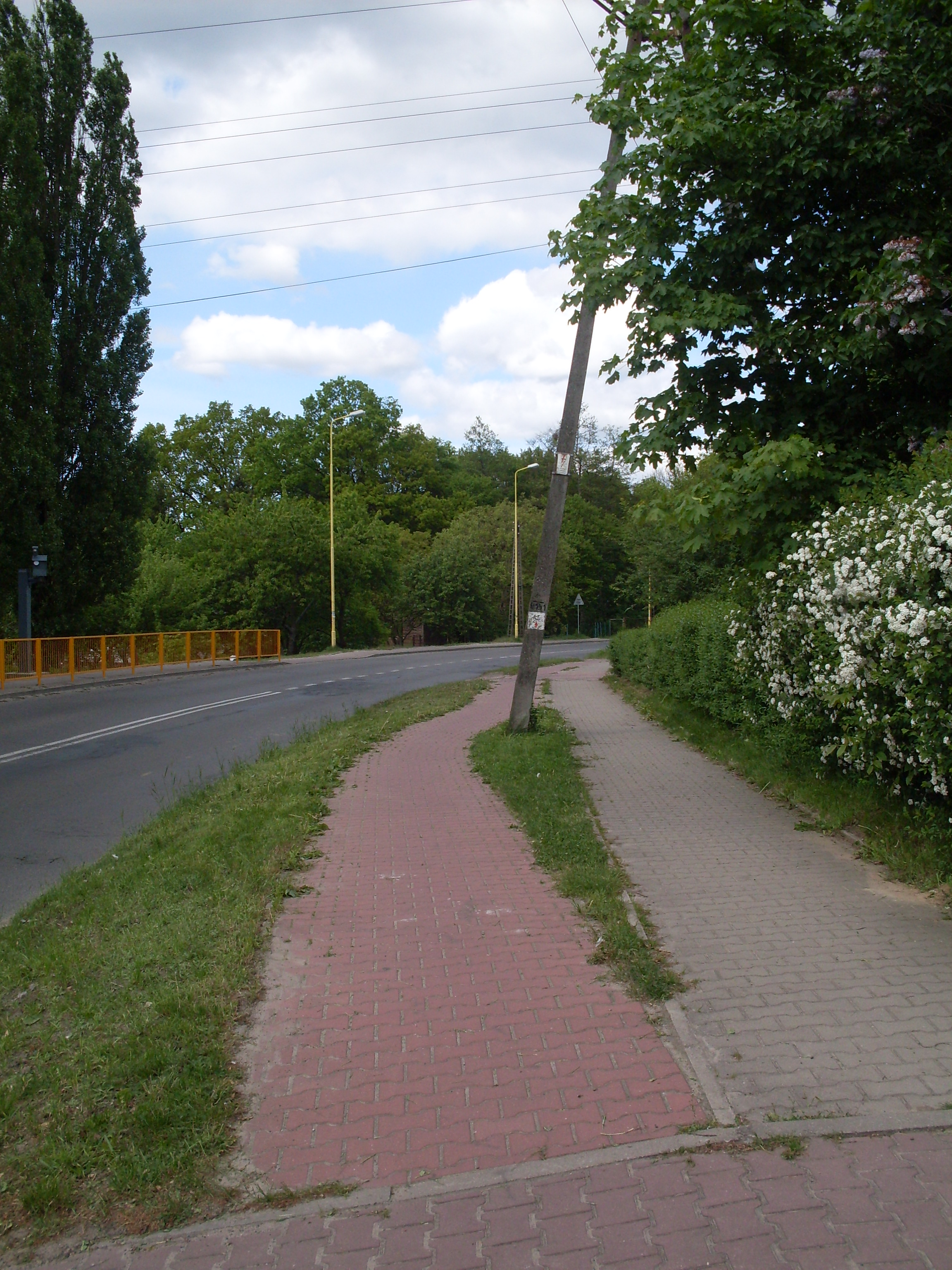 Droga rowerowa Pilchowo - Szczecin